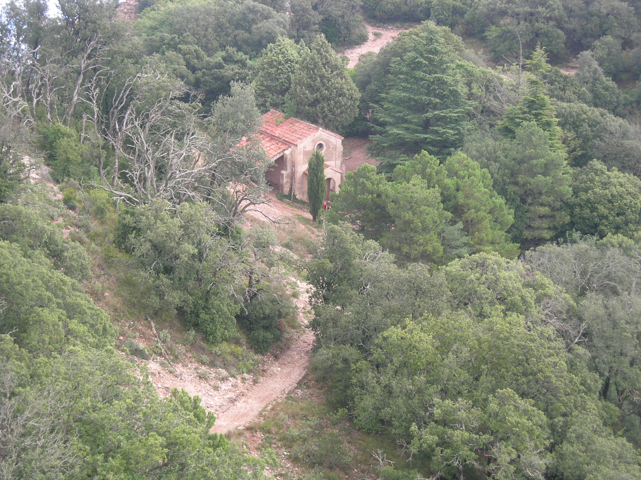 Montserrat This is a a photo of a natural area in Catalonia, Spain, with id: ES510139